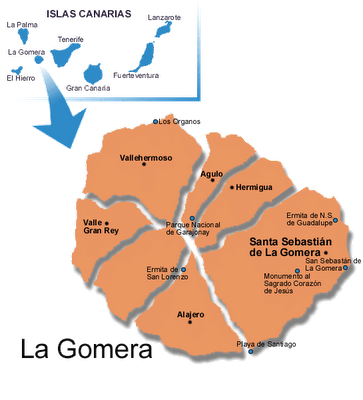 ingles